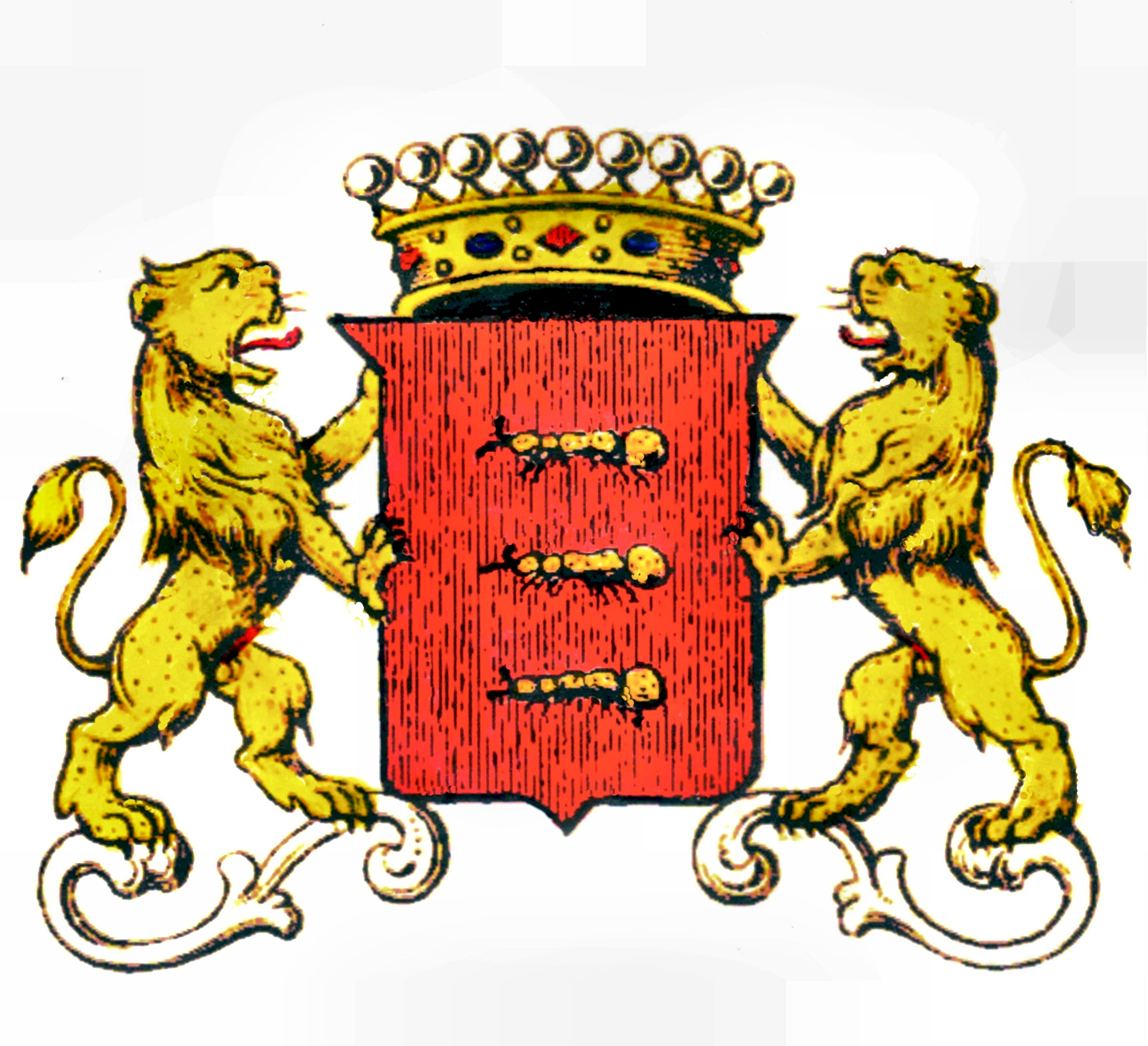 Wappen der Grafen von Bigot de St. Quentin (ältere Ausführung)